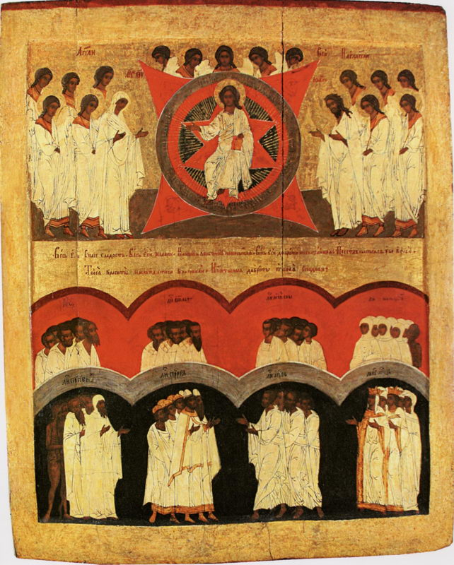 Неделя всех святых Век:XVI Место создания: Россия Место хранения: Поступила в музей в 1921 году из собрания А.А. Титова. Реставрация: Реставрирована в 1986 году в ВХНРЦ Ярцевой Л.К. Размер: 89 х 72 Материал: Дерево, темпера Иконографическая справка: Композиция иконы разделена по горизонтали на две части. Вверху, в центре, изображен Христос Эммануил во славе между предстоящими в молении Богоматерью и Иоанном предтечей. Он окружен сонмом ангельских сил, среди которых выделены лики ангелов и архангелов. В нижней части иконы в два ряда изображены группы святых, обрамленных красными и зеленовато-серыми волнообразными полосами, напоминающими соединенные между собой арки. Каждая из групп представляет собой определенный лик святости, названный в надписи. Вверху - праотцы, святители, мученики и преподобные жены; внизу - преподобные, пророки, апостолы и мученики. Данная иконография заимствована из композиций "Шестоднева", где каждый из дней недели, согласно богослужебной традиции, соотносился с прославлением определенных событий и чинов святости.